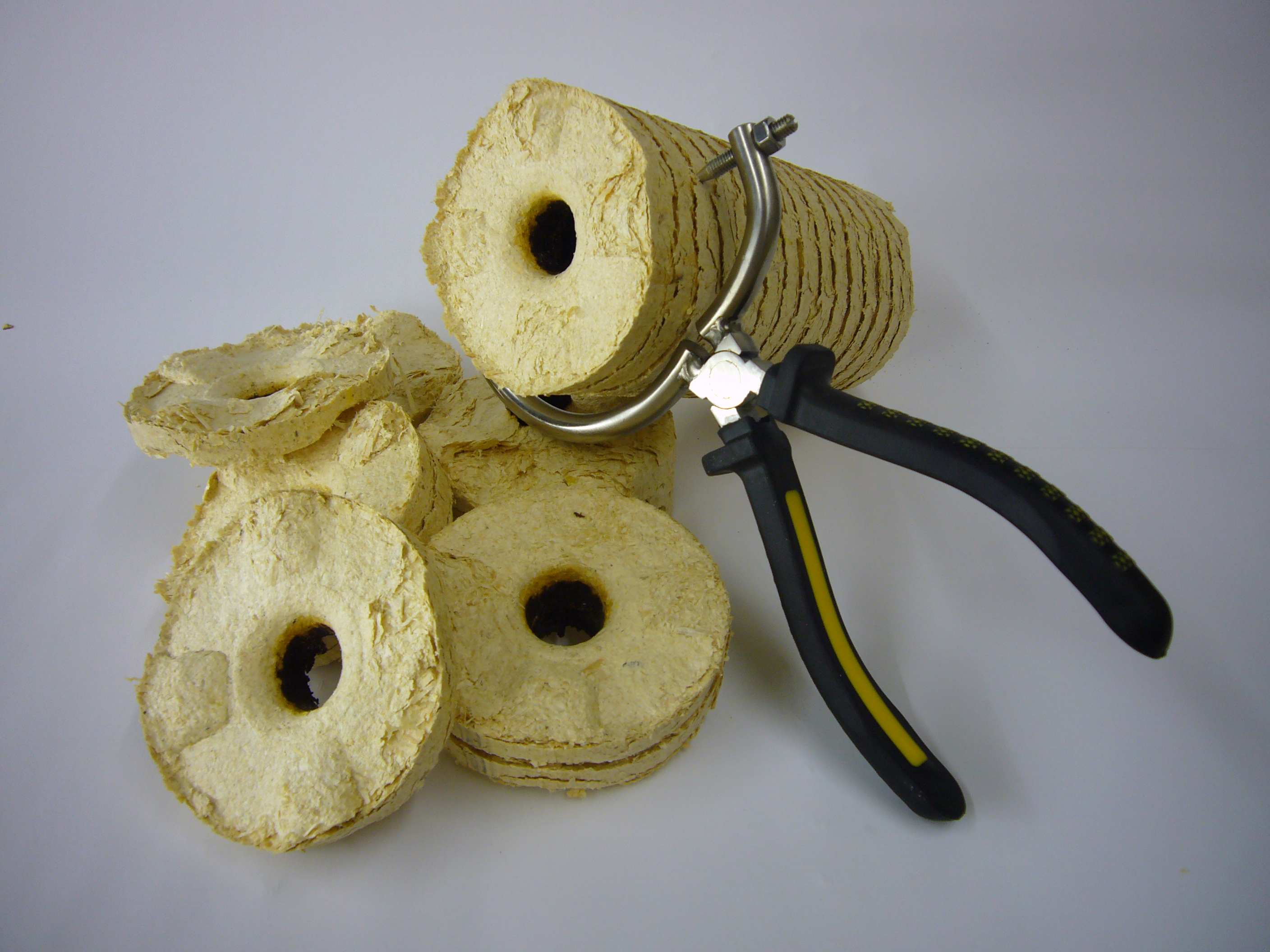 Beispiel zum Umgang mit der Zange